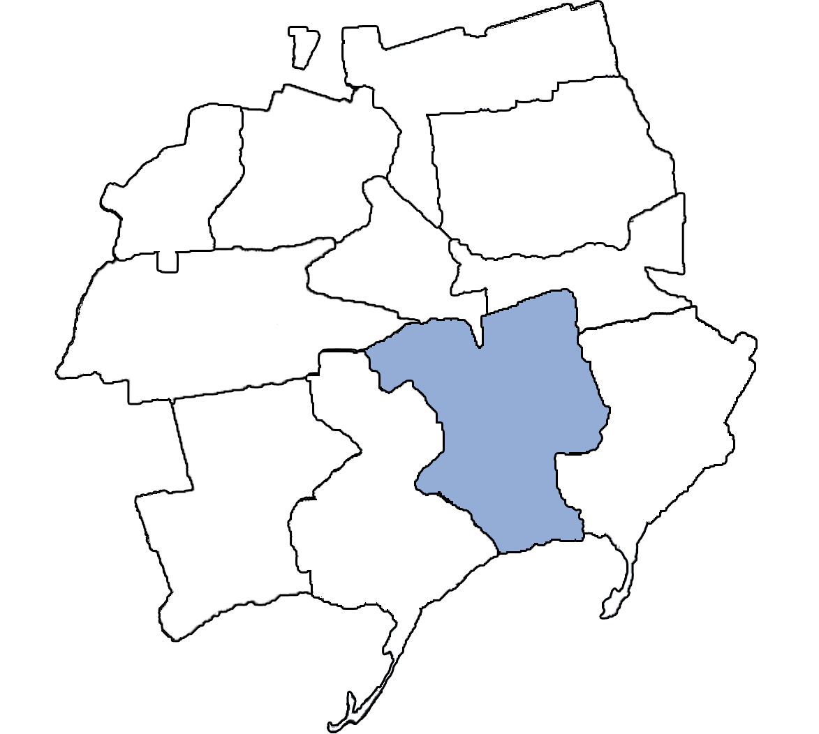 Карта Бердянської округи Андріївського району